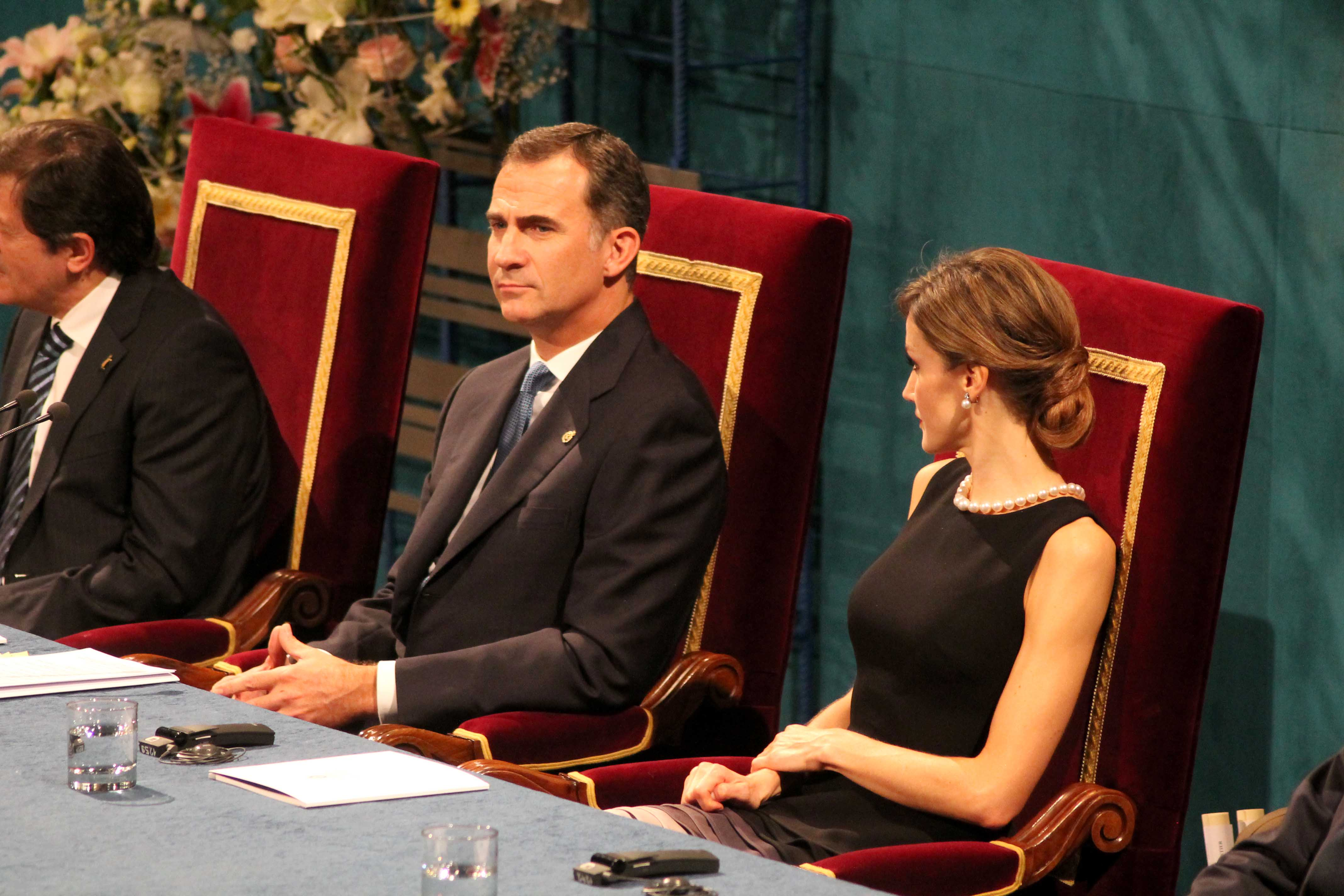 Premios Princesa de Asturias 2015